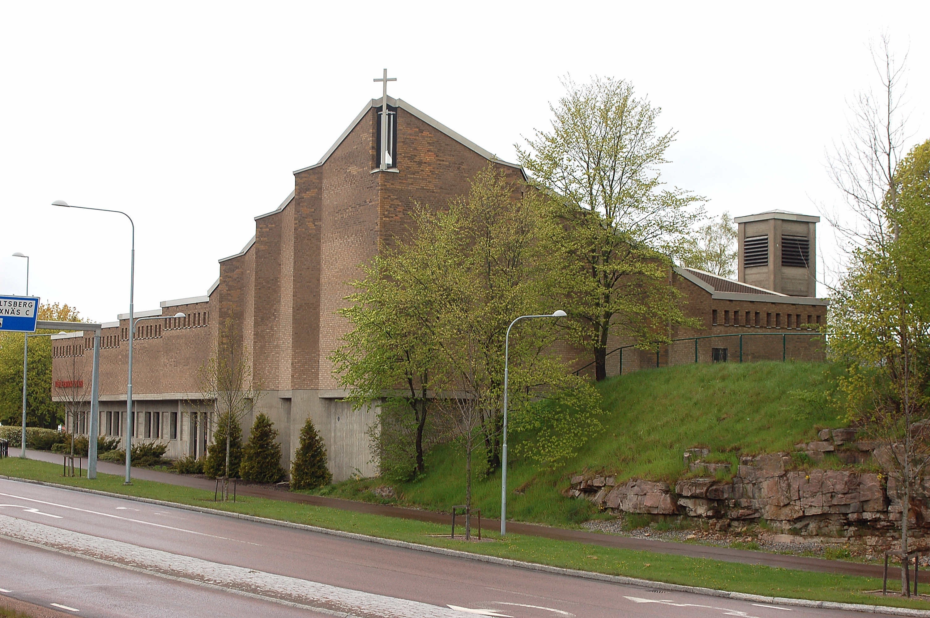 Västerstrandskyrkan belägen i Våxnäs, Karlstad.